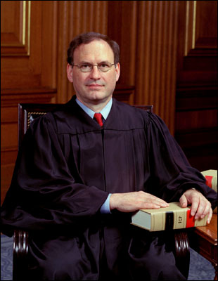 Samuel Alito, Supreme Court Justice.